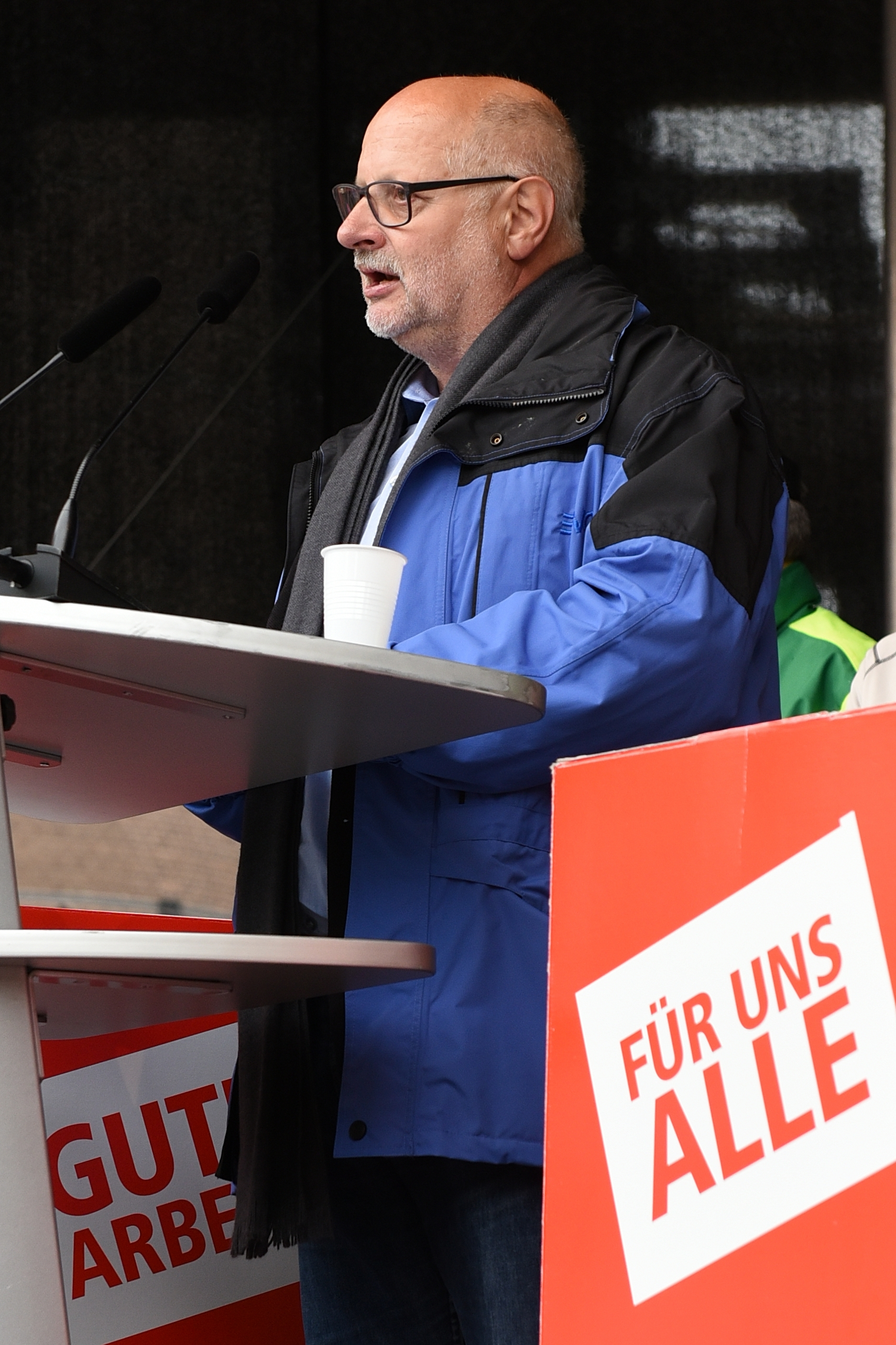 Kundgebung zum Tag der Arbeit 2017 im Landschaftspark Duisburg.